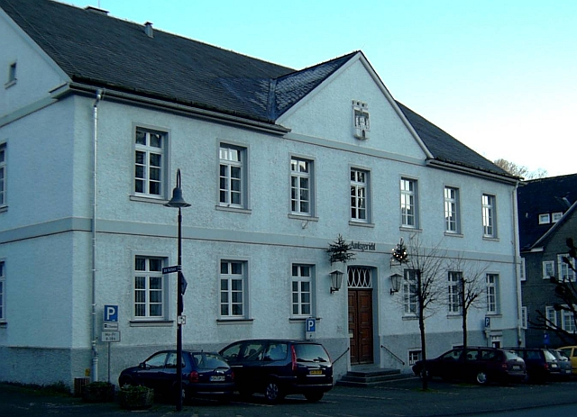 Amtsgericht Schmallenberg im Ortsteil Bad Fredeburg , Germany.